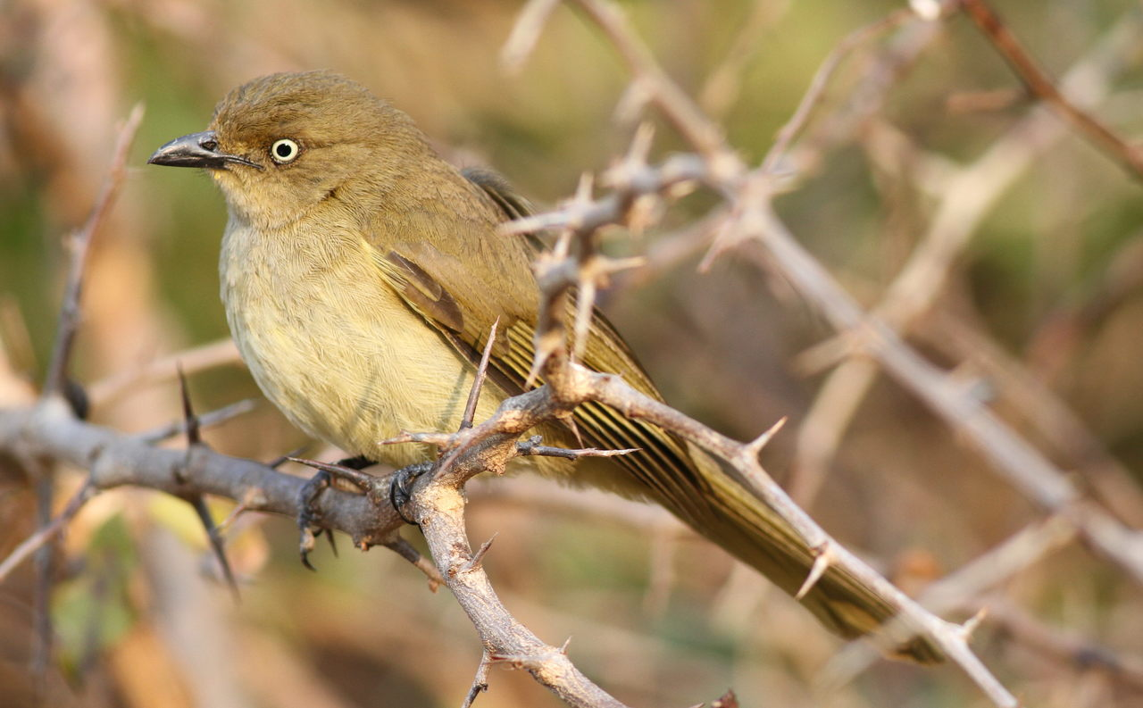 Sombre greenbul, Andropadus importunus, at uMkhuze Game Reserve, kwaZulu-Natal, South Africa